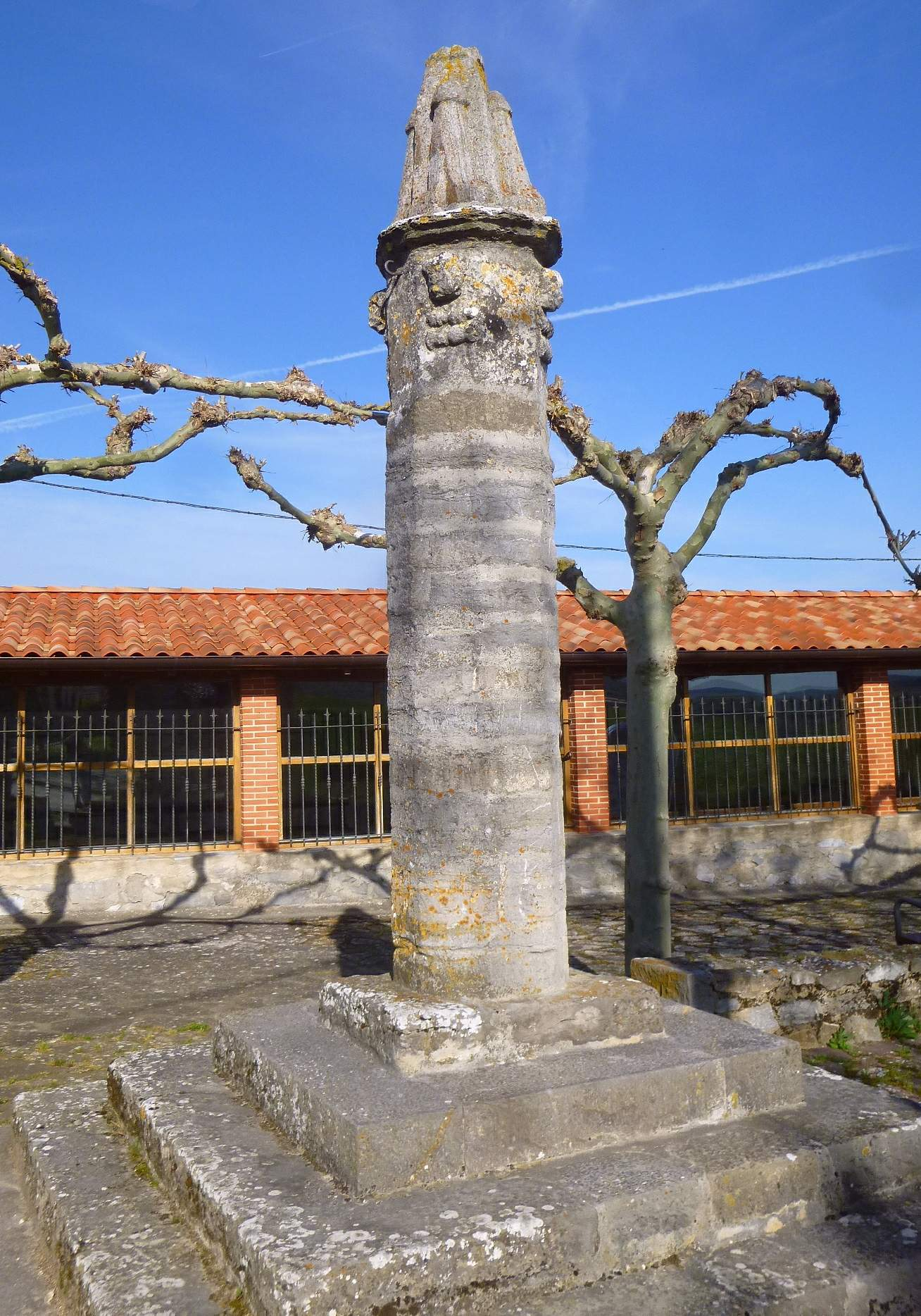 Mendoza (Vitoria, Álava) - Picota